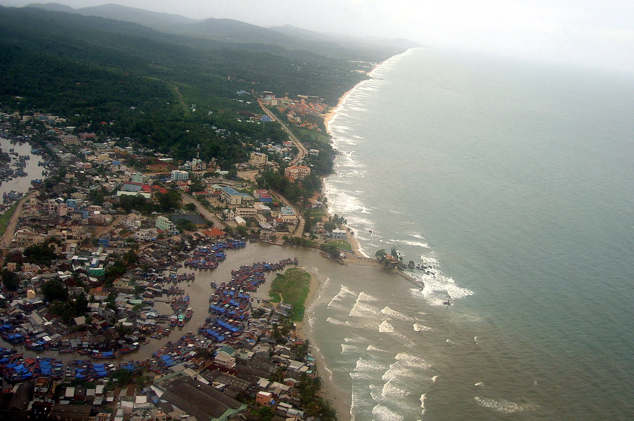 L'embouchure de la rivière Duong Dong